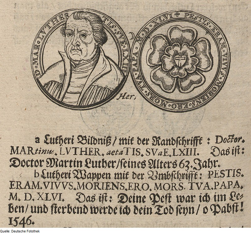 Original image description from the Deutsche Fotothek Münze & Gedenkmünze & Schaumünze & Medaille & Lutherrose